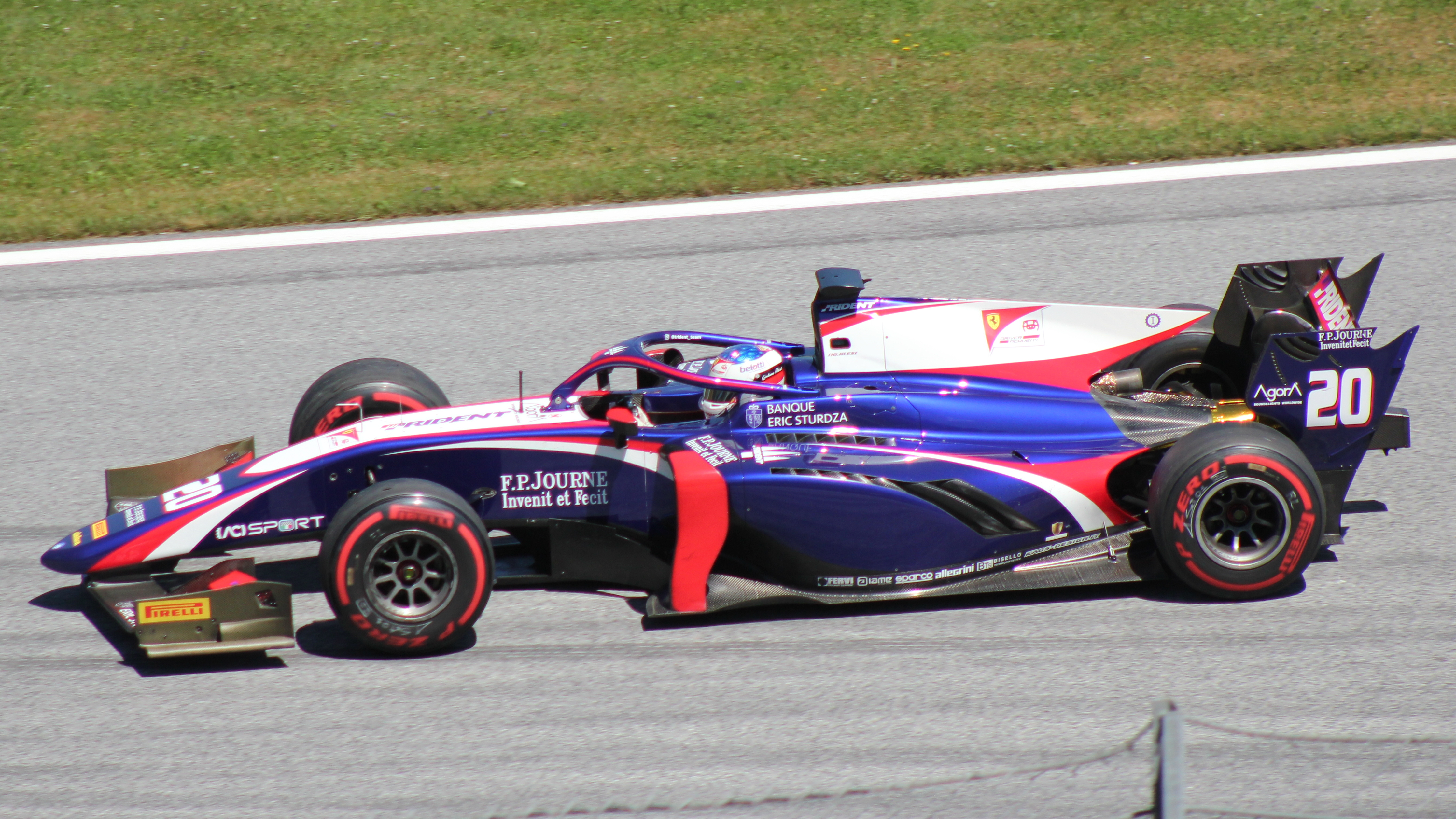 Giuliano Alesi beim Rennwochenende in Österreich 2019